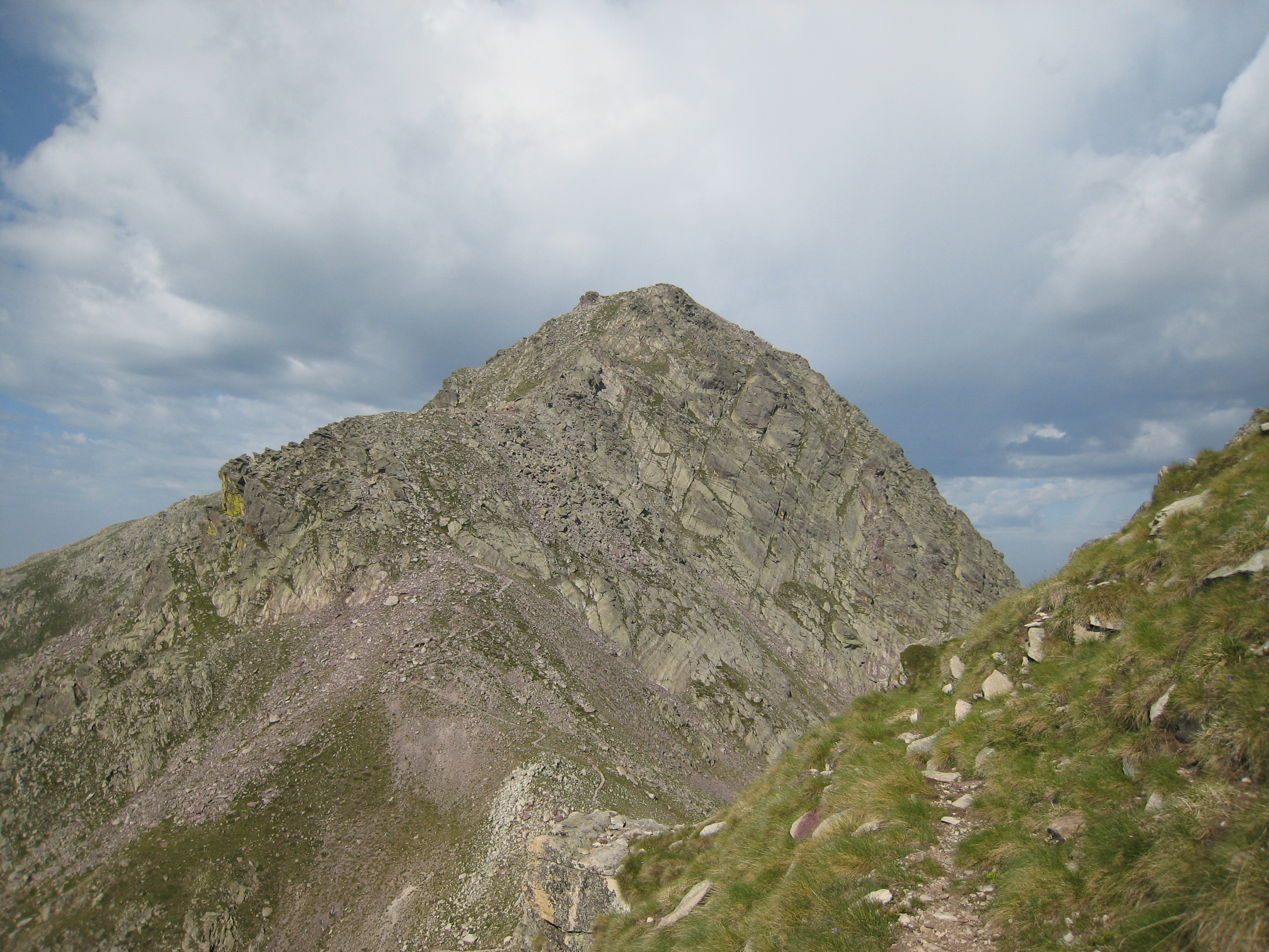 Cime du diable